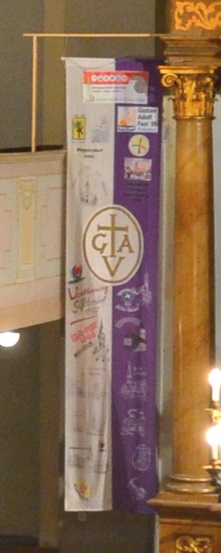 Fahne des Gustav-Adolf-Vereins in der evangelischen Kirche Ödenburg (Sopron)